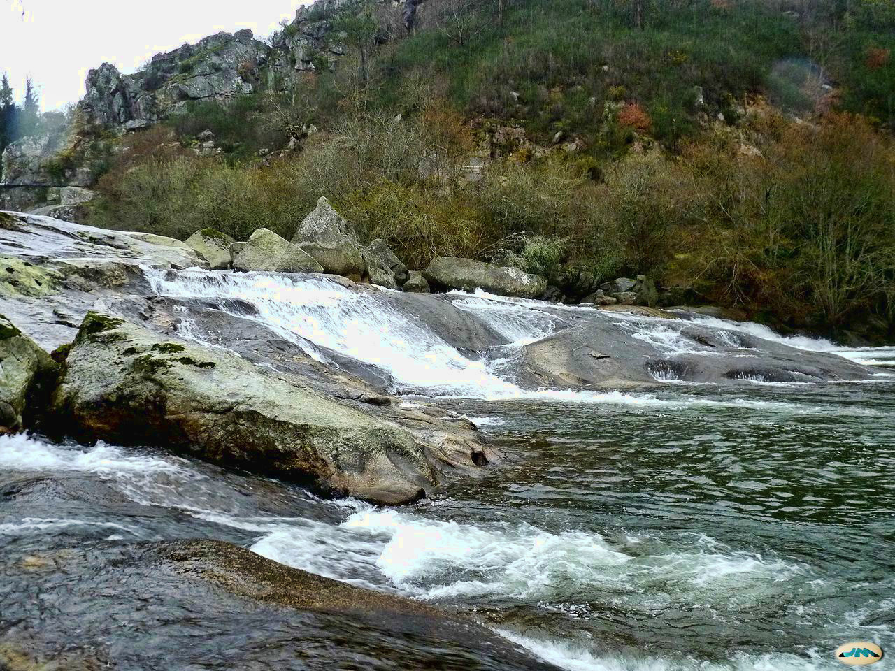 Caldas de Reis-Segade-Fervenza1